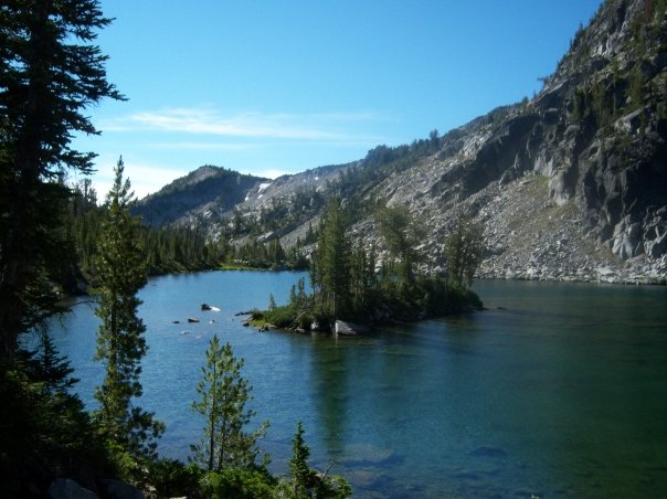 Maxwell Lake